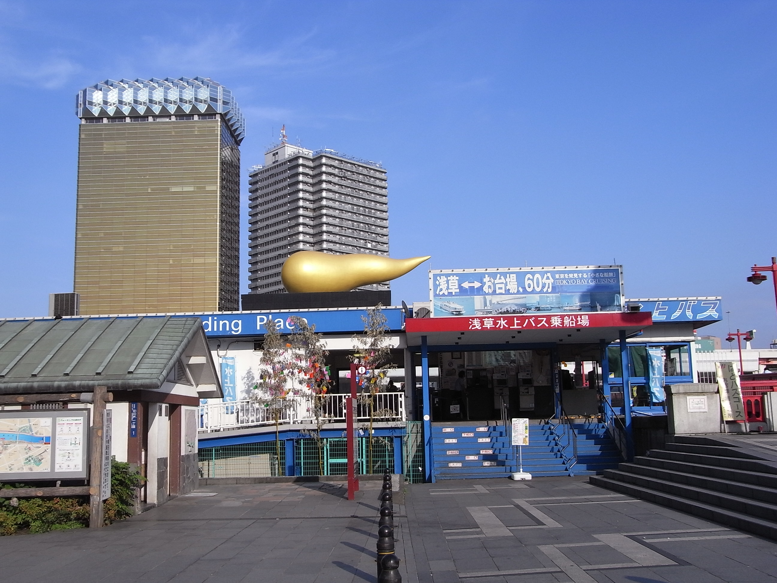 東京観光汽船 浅草営業所